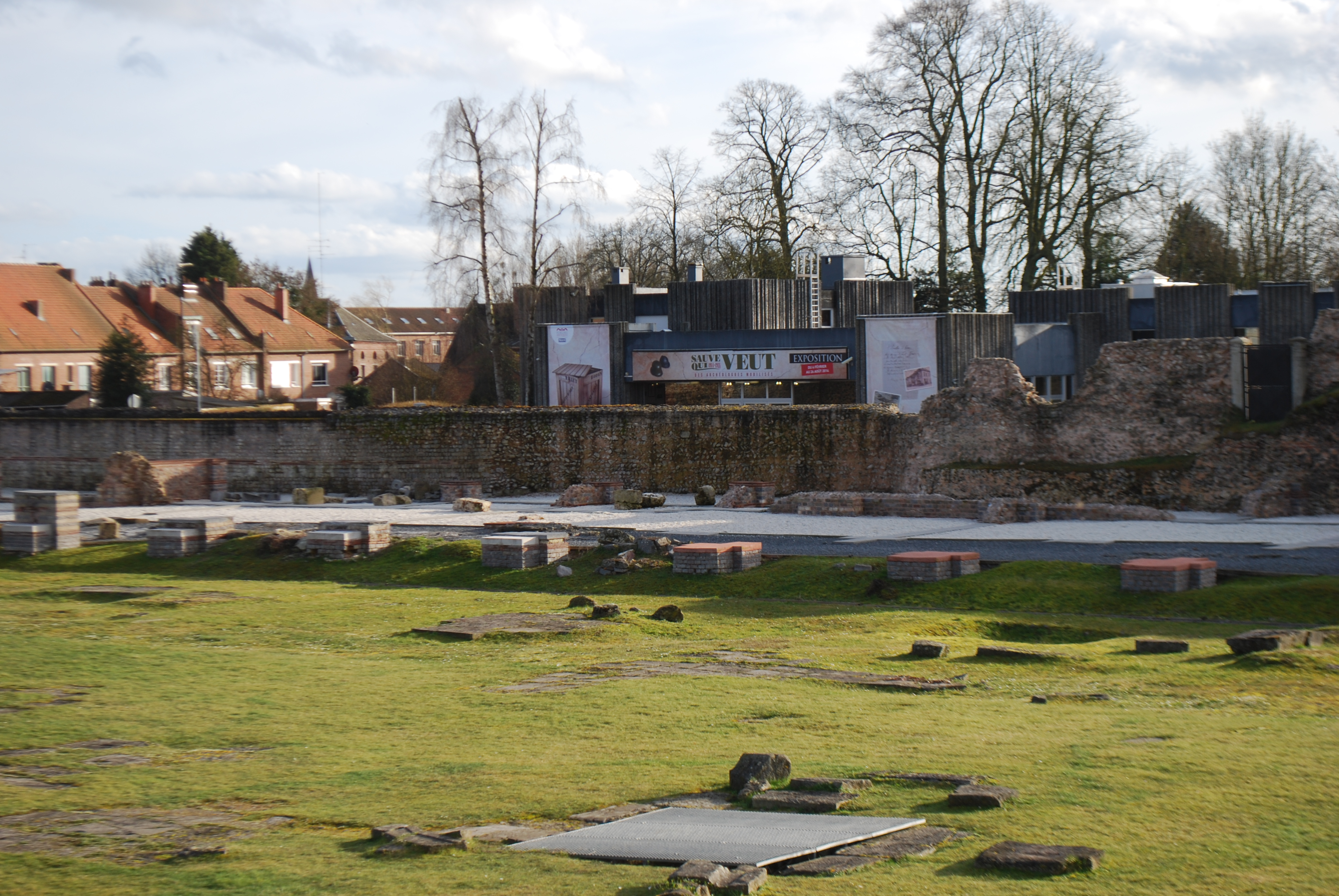 Vue du site archéologique de Bavay (Nord, France).